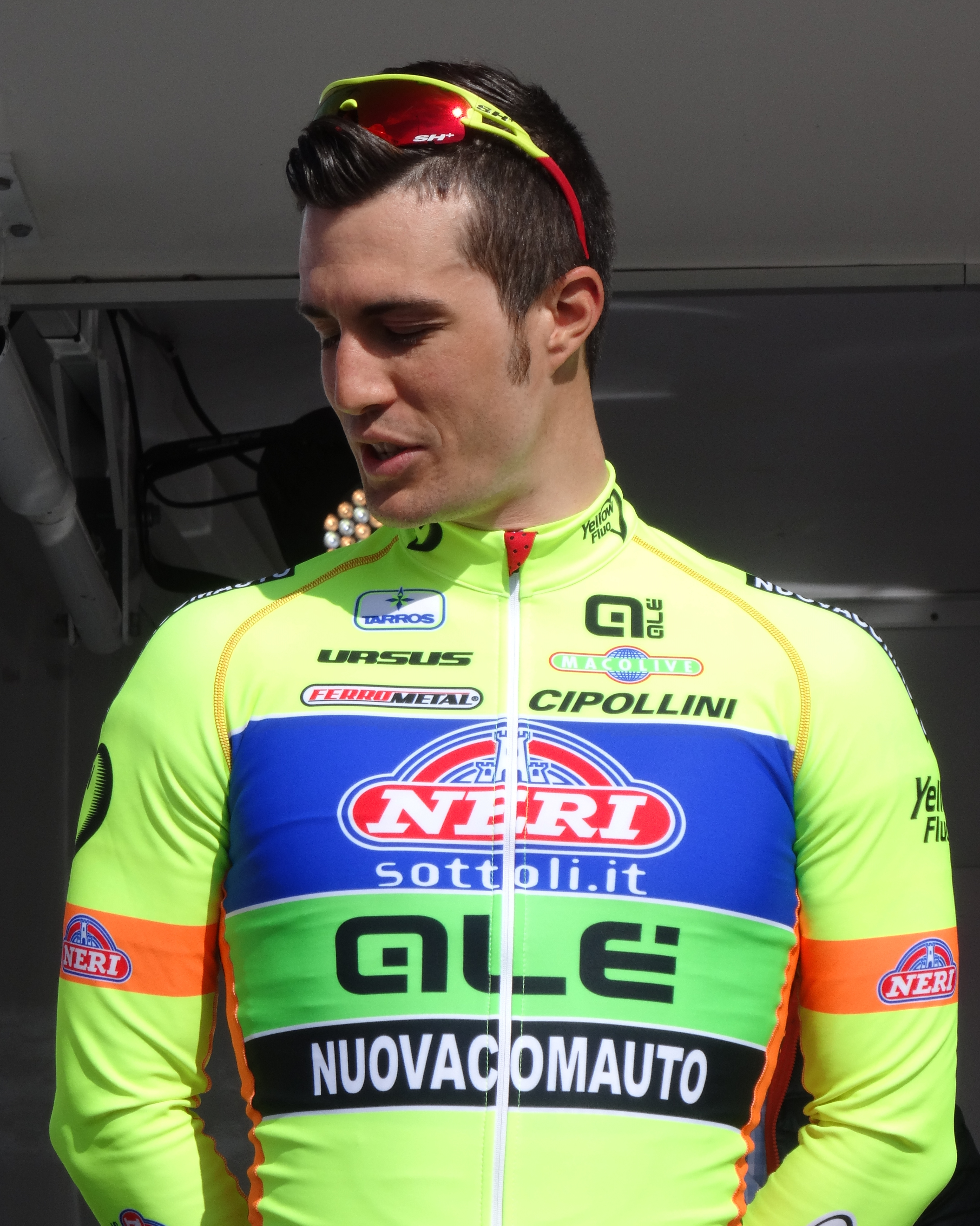 Reportage réalisé le jeudi 17 avril à l'occasion du départ et de l'arrivée du Grand Prix de Denain 2014 à Denain, Nord, Nord-Pas-de-Calais, France.